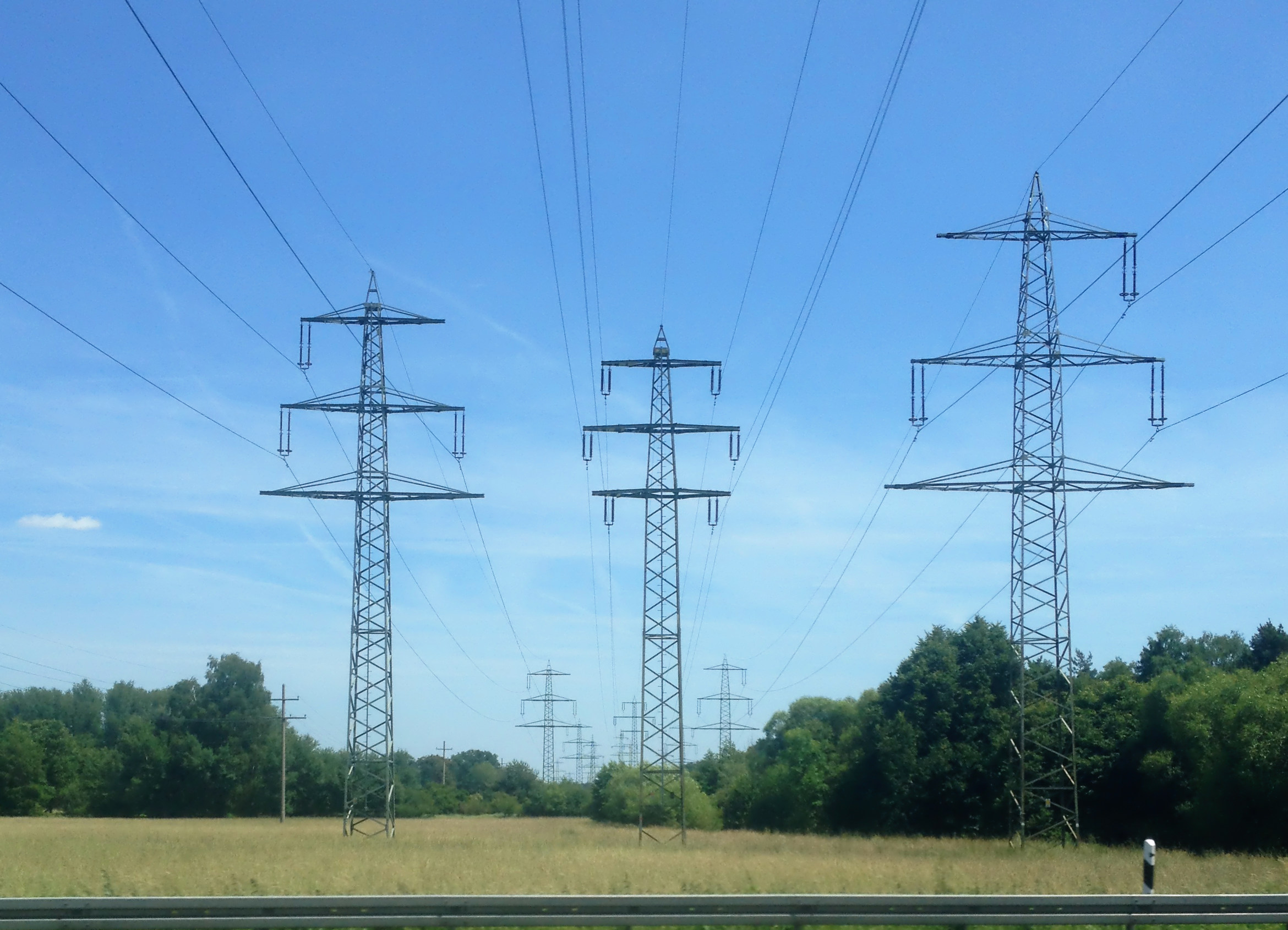 Ältere Hochspannungsleitungen der RWE an der A 5 bei Mörfelden